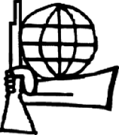 Logo der 1971 in West-Berlin gegründeten linksterroristischen Vereinigung Bewegung 2. Juni